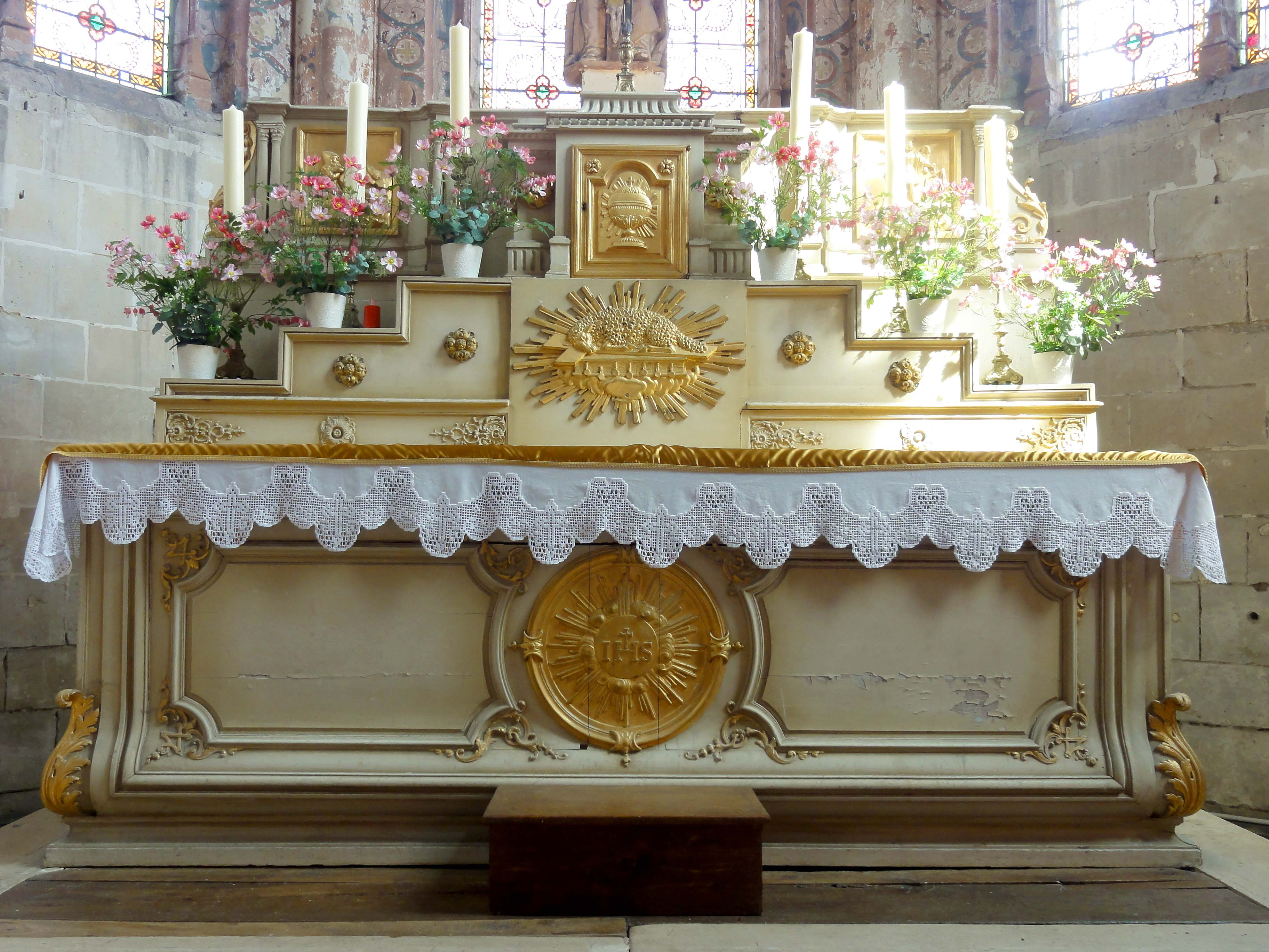 Mobilier de l'église (voir titre).